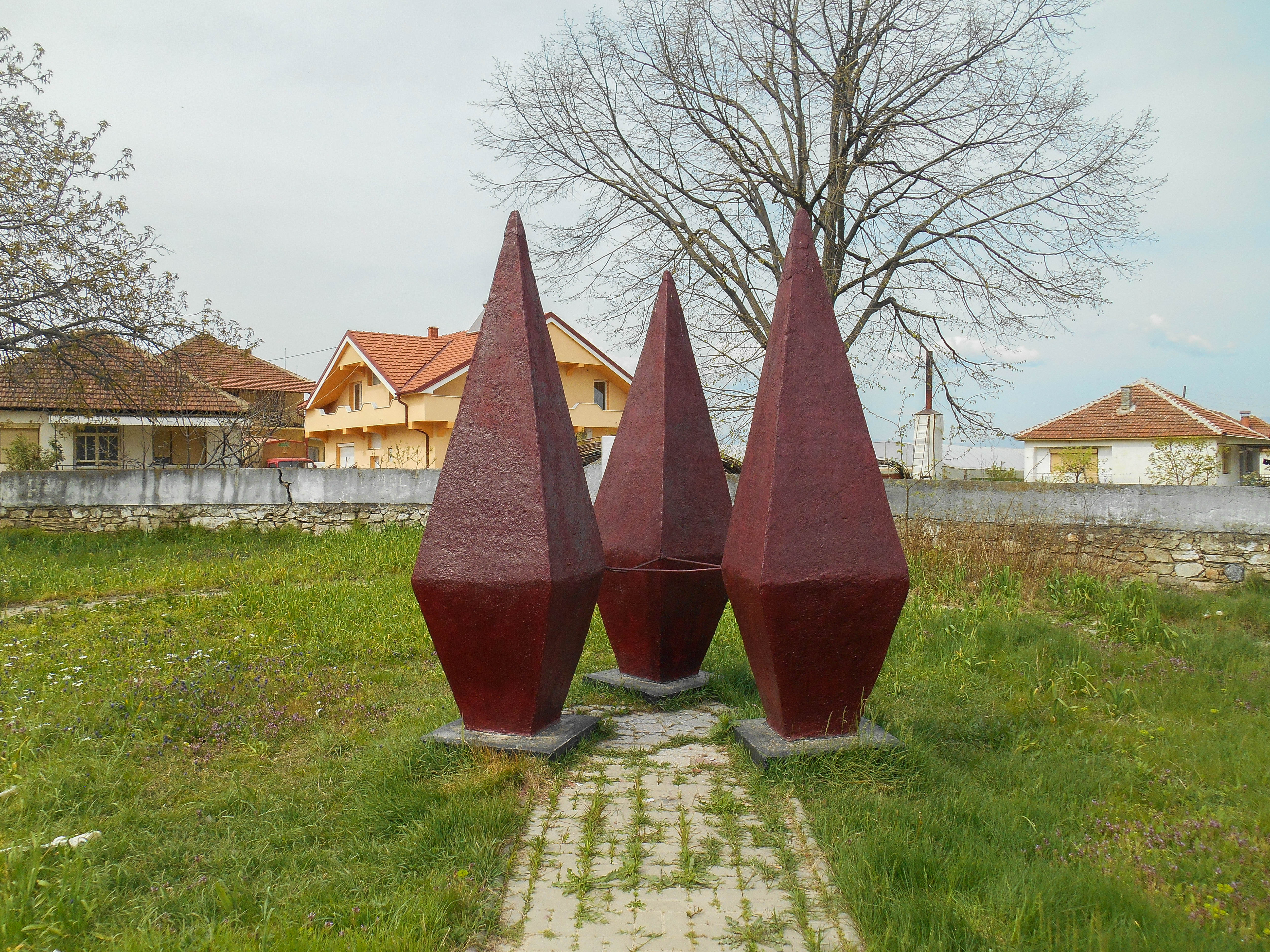 Спомен Костурница - Куклиш